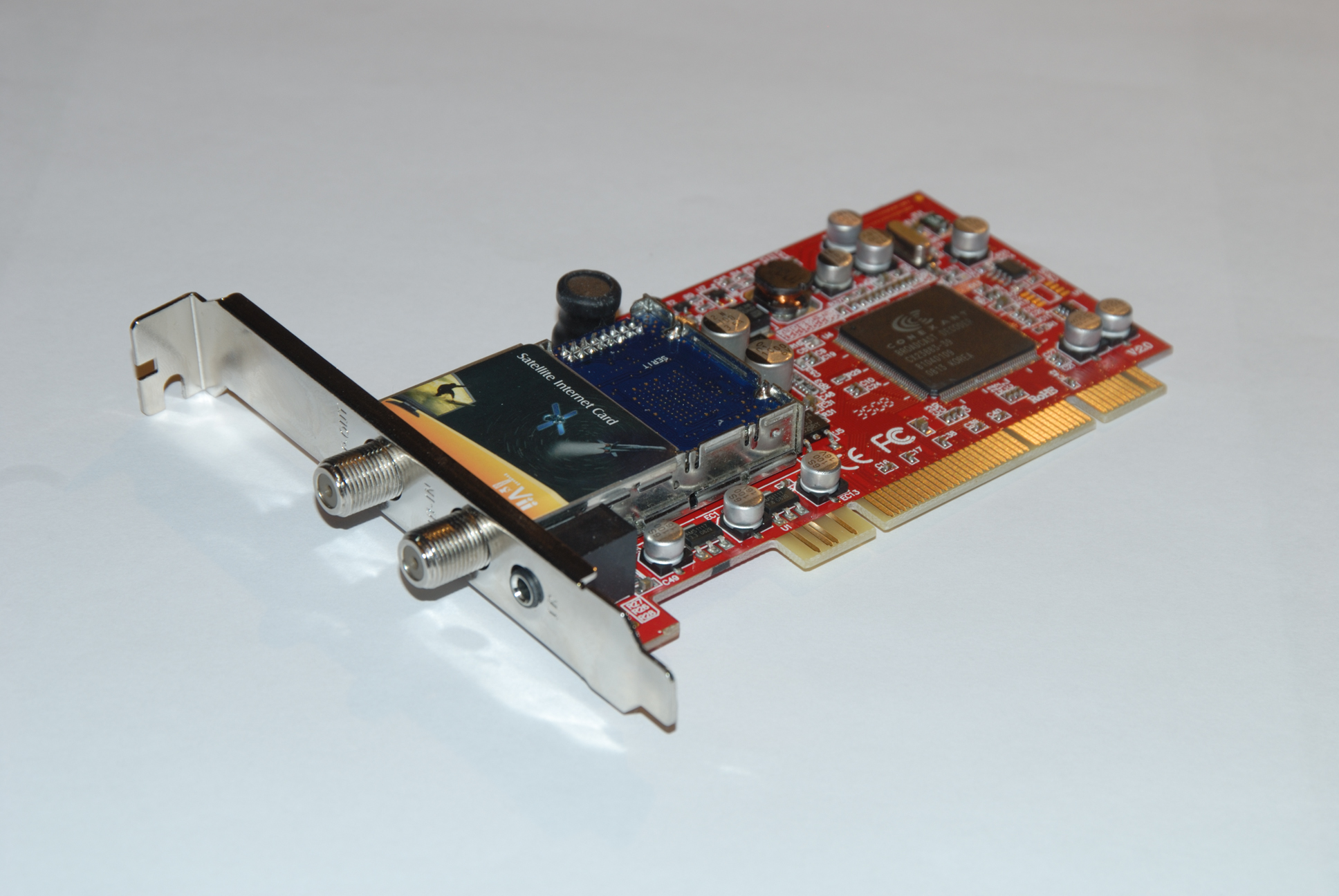 Карта DVB-S/S2 Tevii S460 с трансляцией принятого сигнала на второй ВЧ-разъем и разъемом для приемника ИК ПДУ